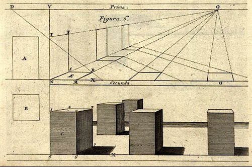 Ilustração em Perspectiva Pictorum et Architectorum